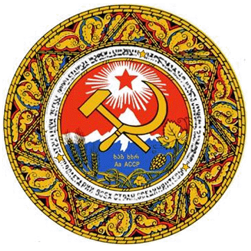 Герб Абхазской АССР 1978—1992 годов